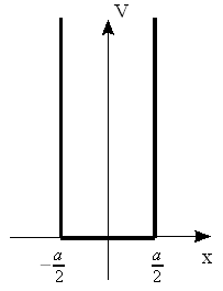 Wykres potencjału dla nieskończonej studni kwantowej